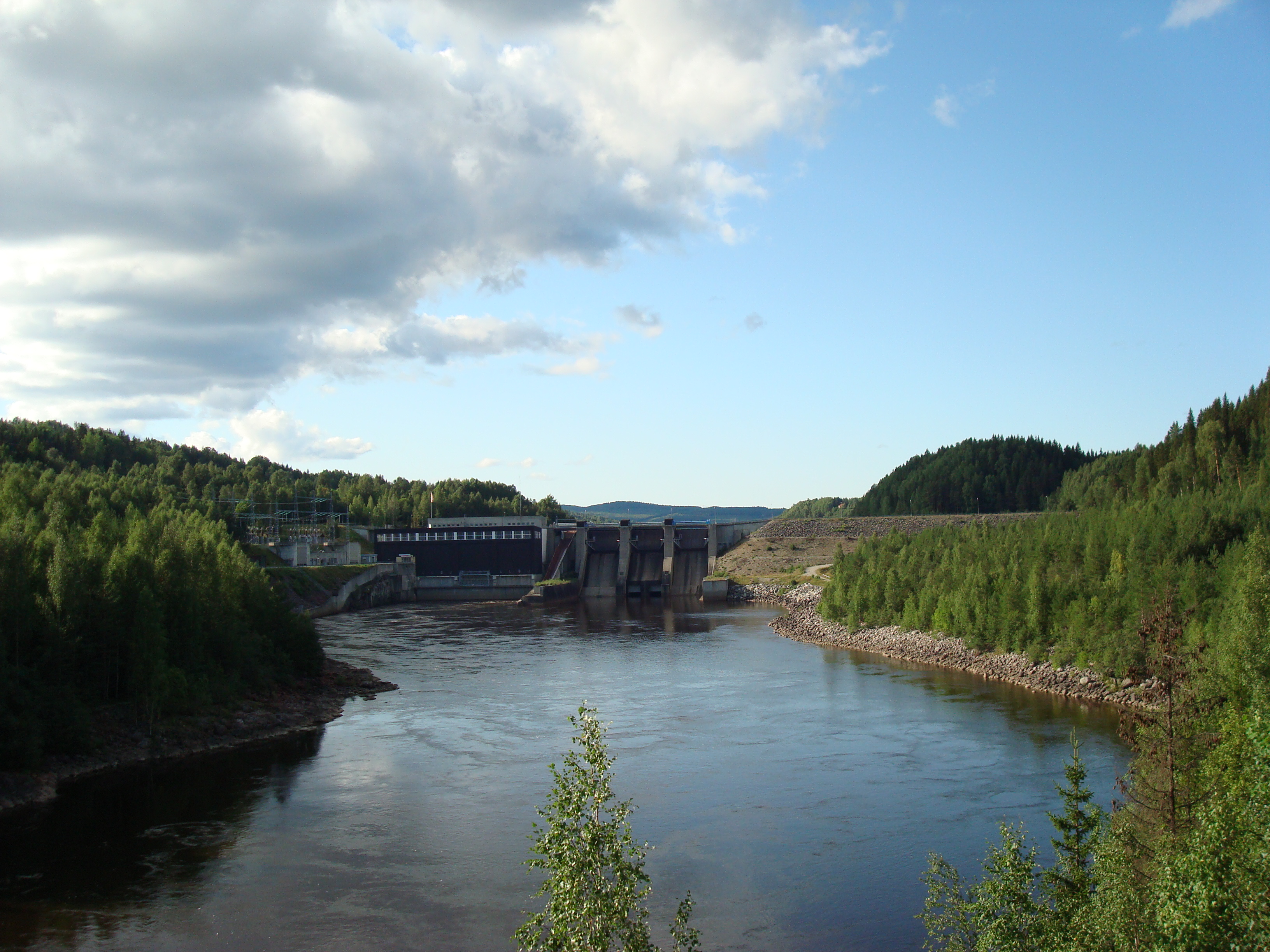 Moforsens kraftverk